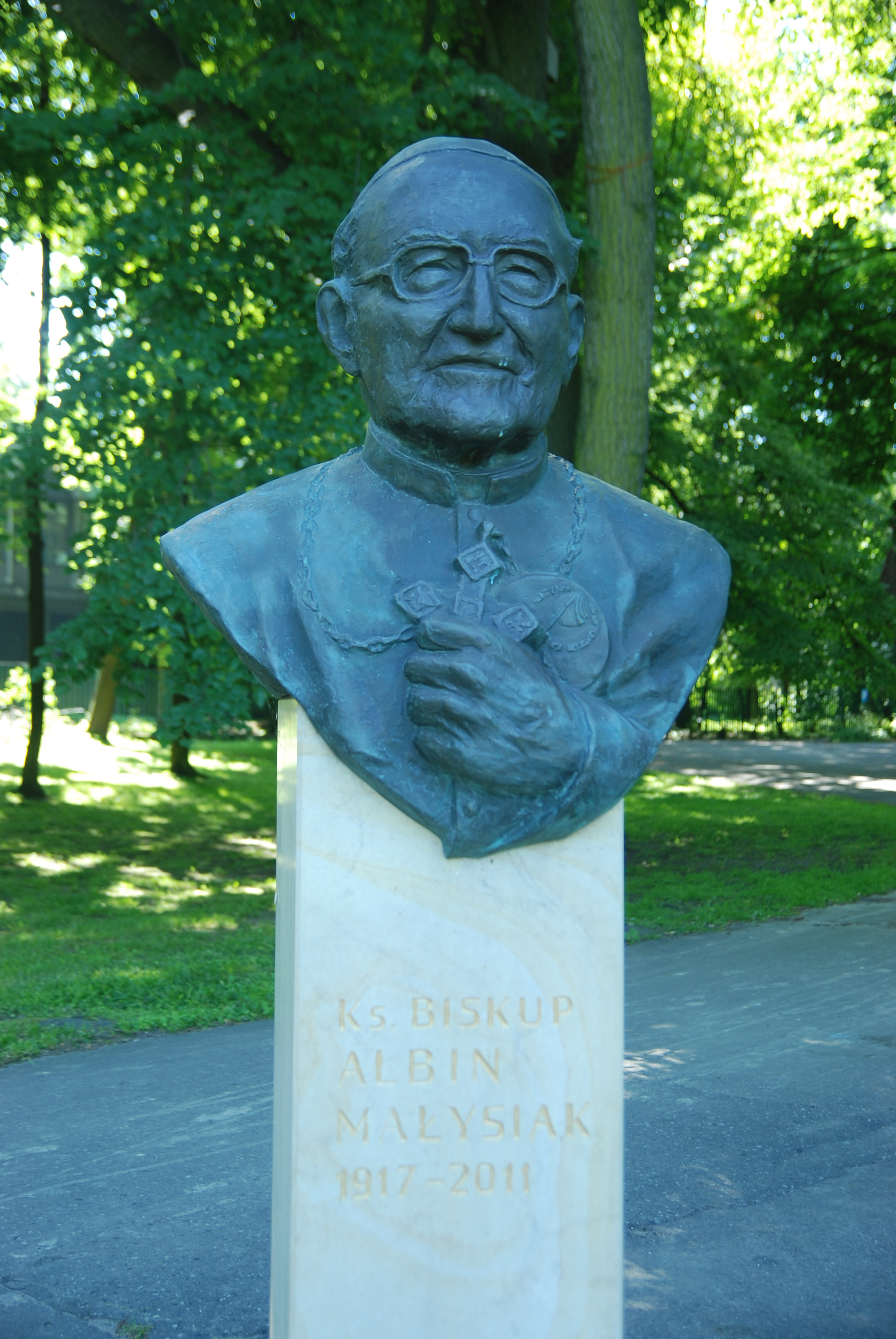 Pomnik ks. bp Albina Małysiaka w Parku Jordana w Krakowie